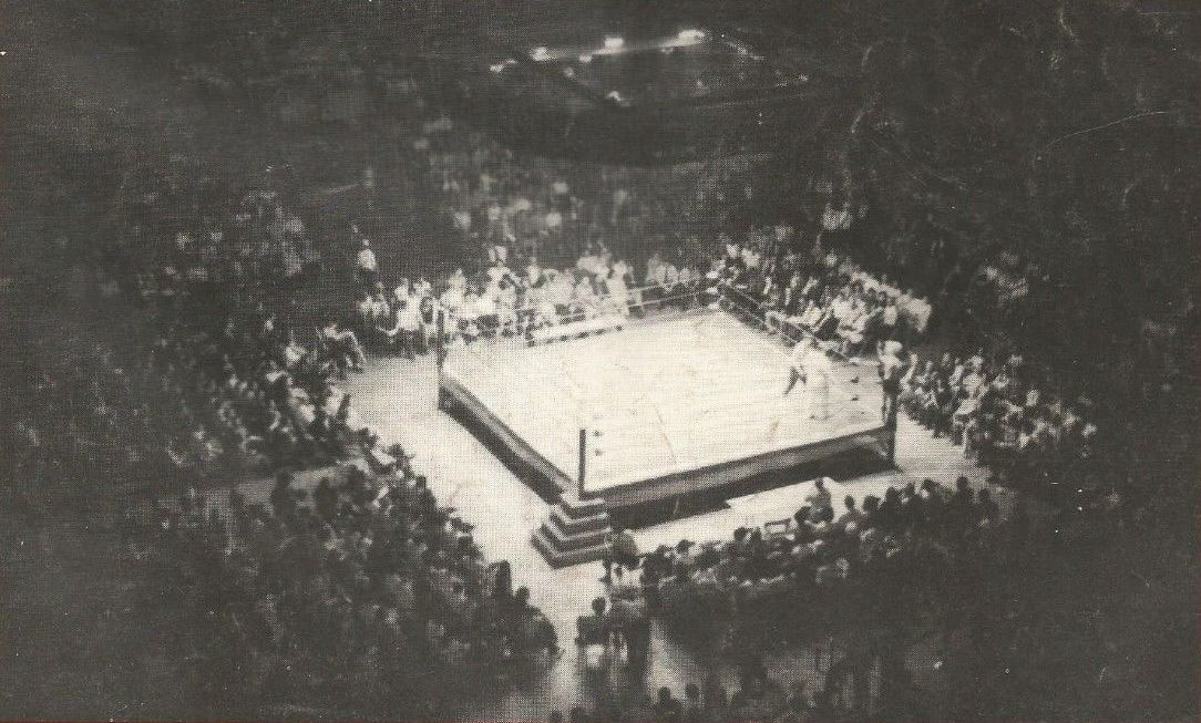 The Sheik en couverture du magazine de catch Body Press de 1972.